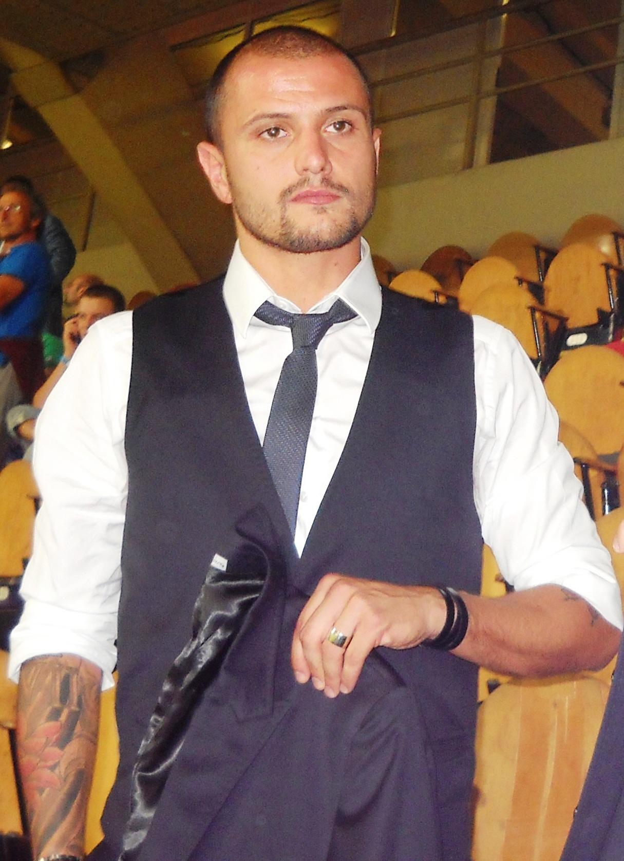 Simone Pepe, calciatore italiano. Foto scattata prima della partita Italia-Far Oer allo stadio Artemio Franchi di Firenze (2010)